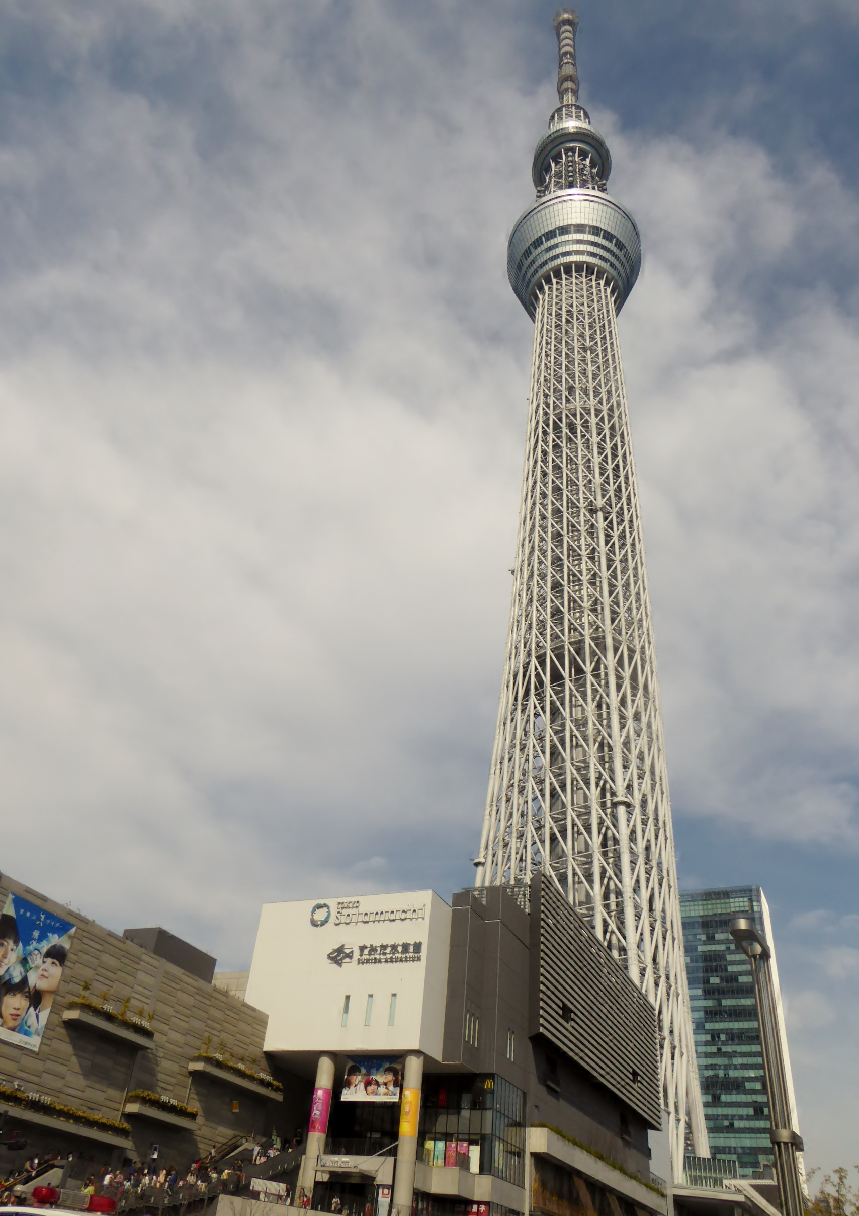 東京スカイツリーを撮影。